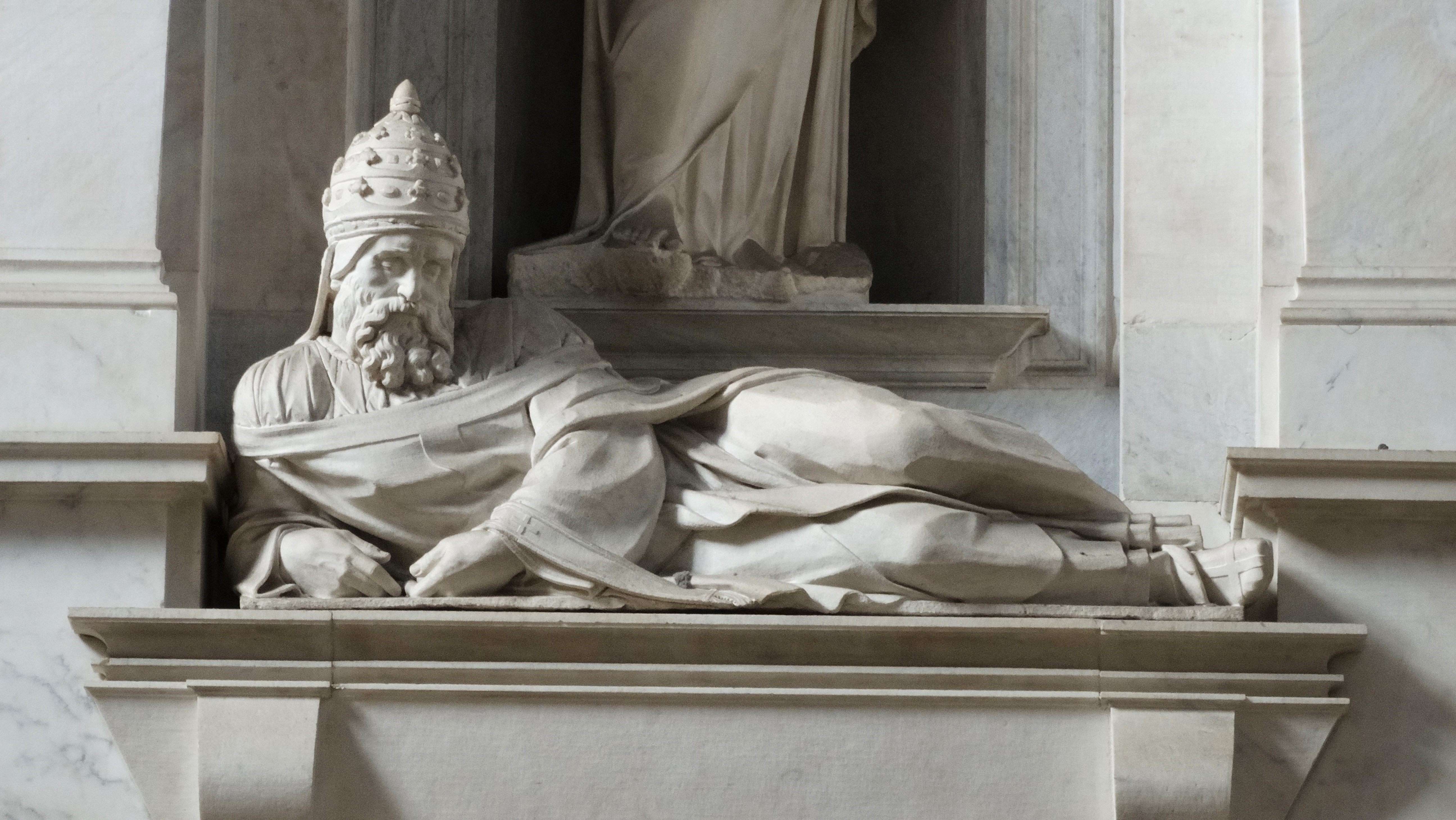 Statua di Giulio II